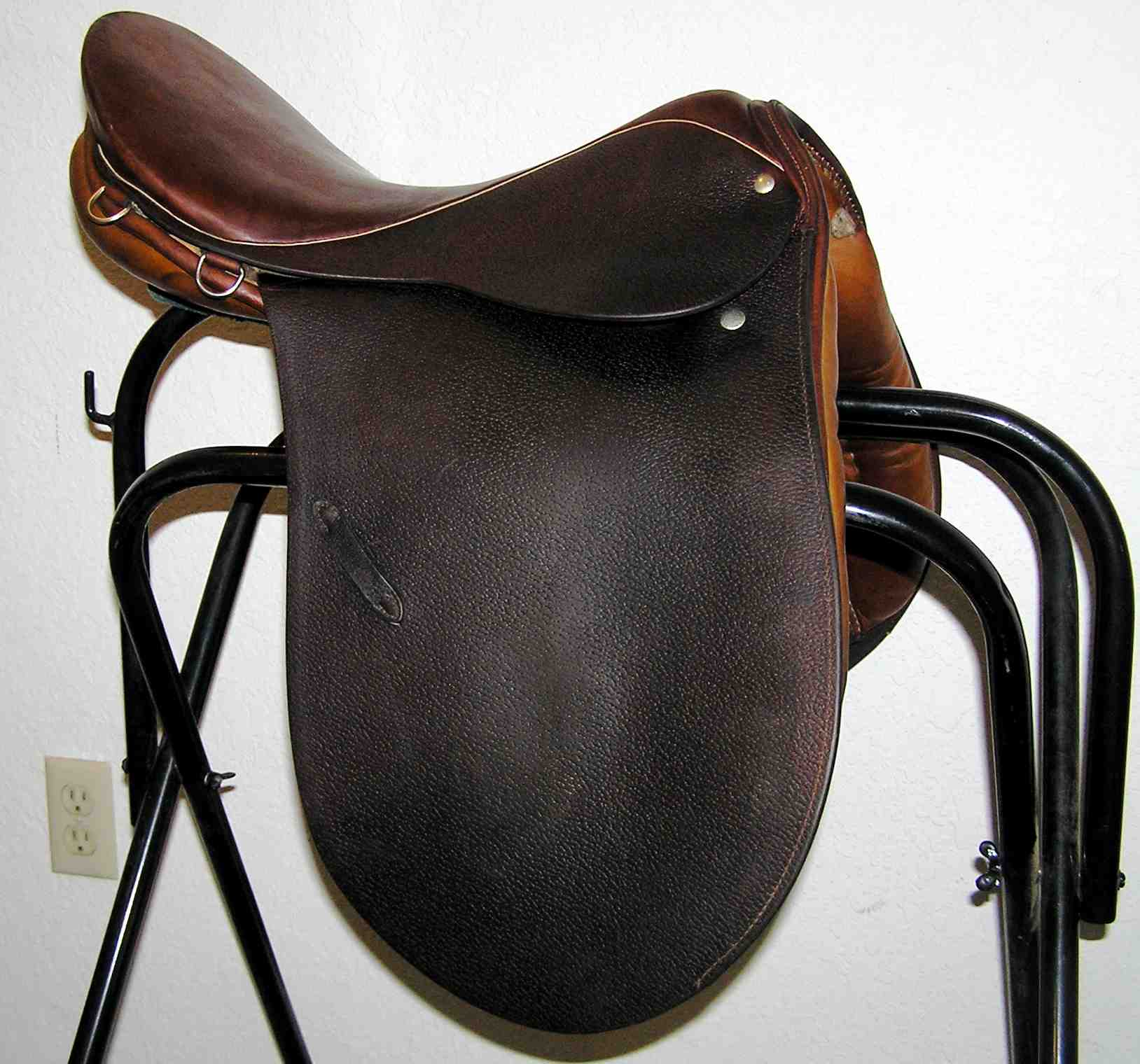 An older Stubben Tristan Dressage saddle